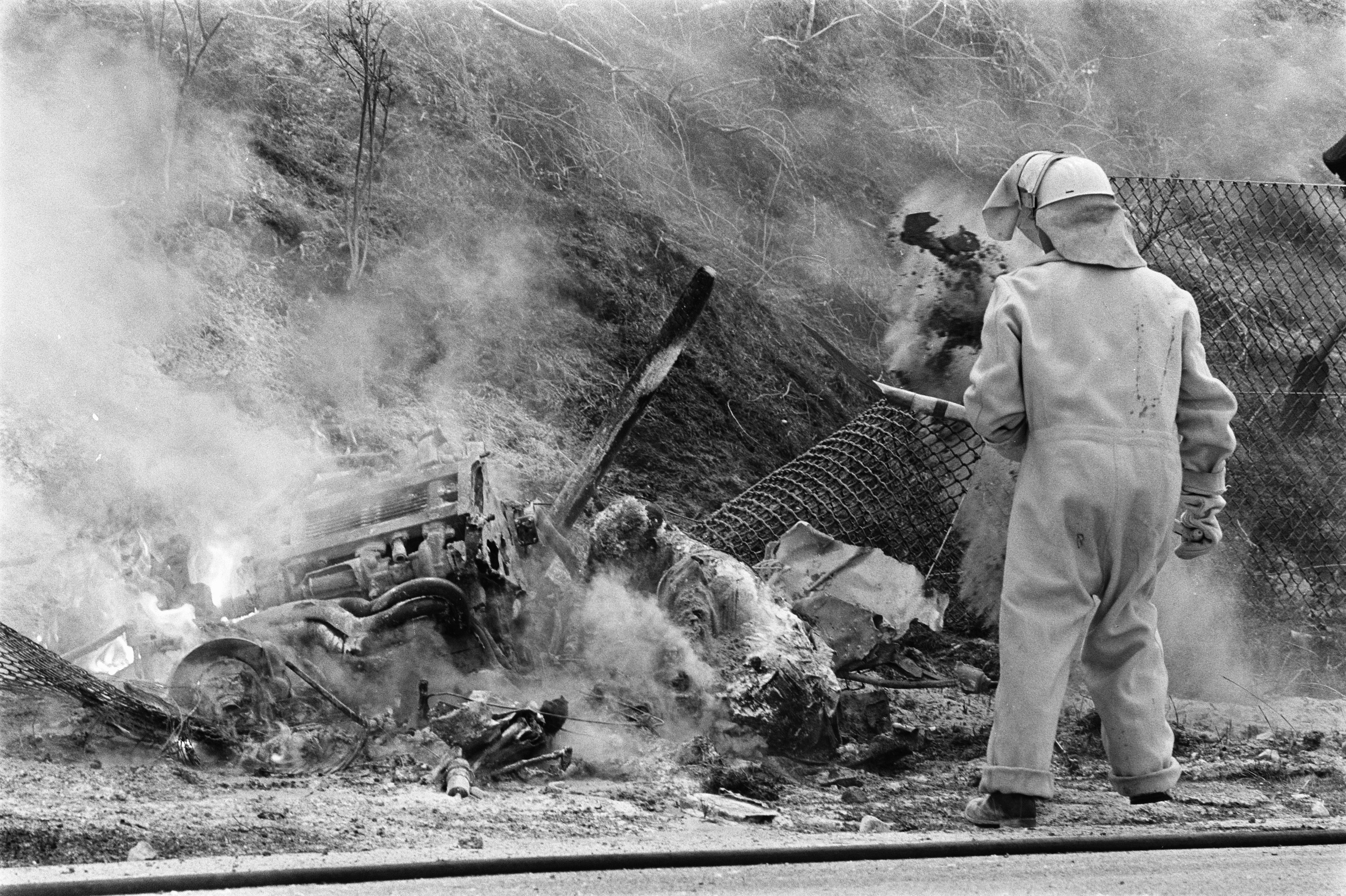 Grand Prix 1970 van Nederland voor Formule I wagens , Zandvoort; Piers Courages wagen vloog in brand; verbrande wagen en (m.) lichaam.